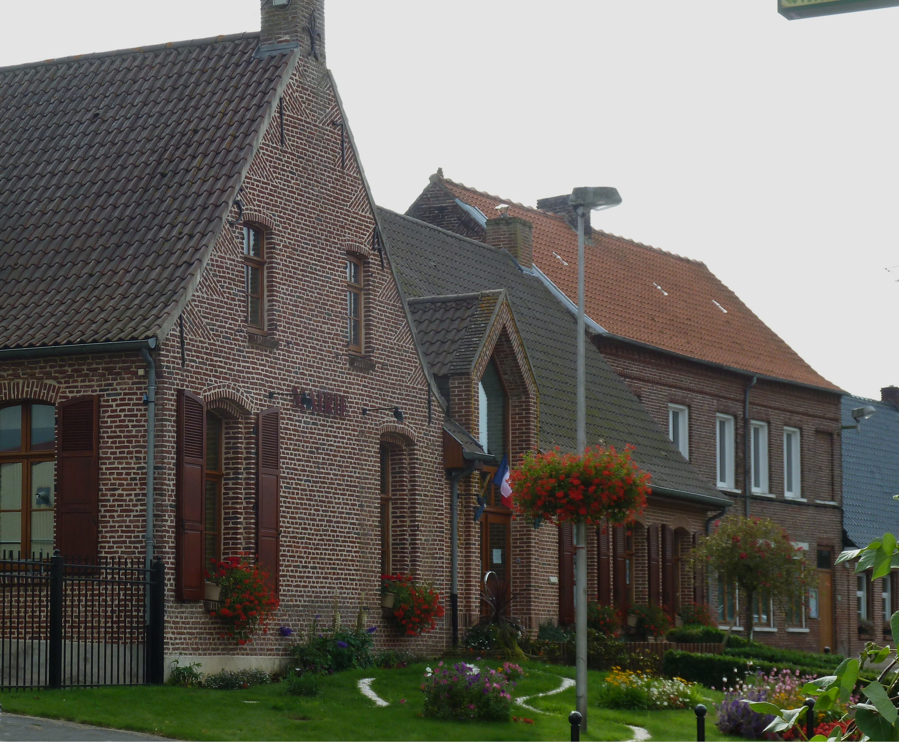 La mairie de Terdeghem Nord, France